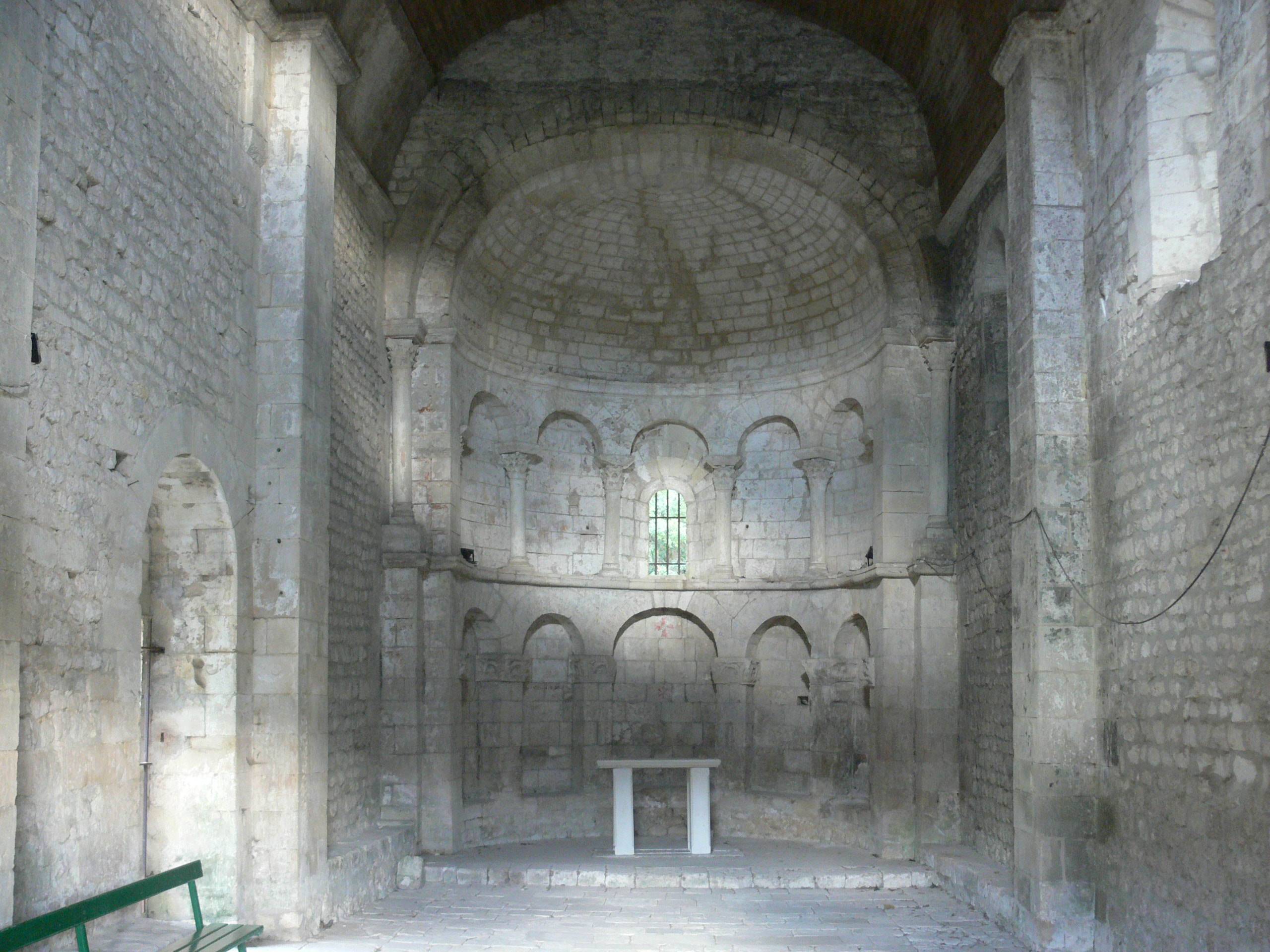 Prieuré du Val des Nymphes